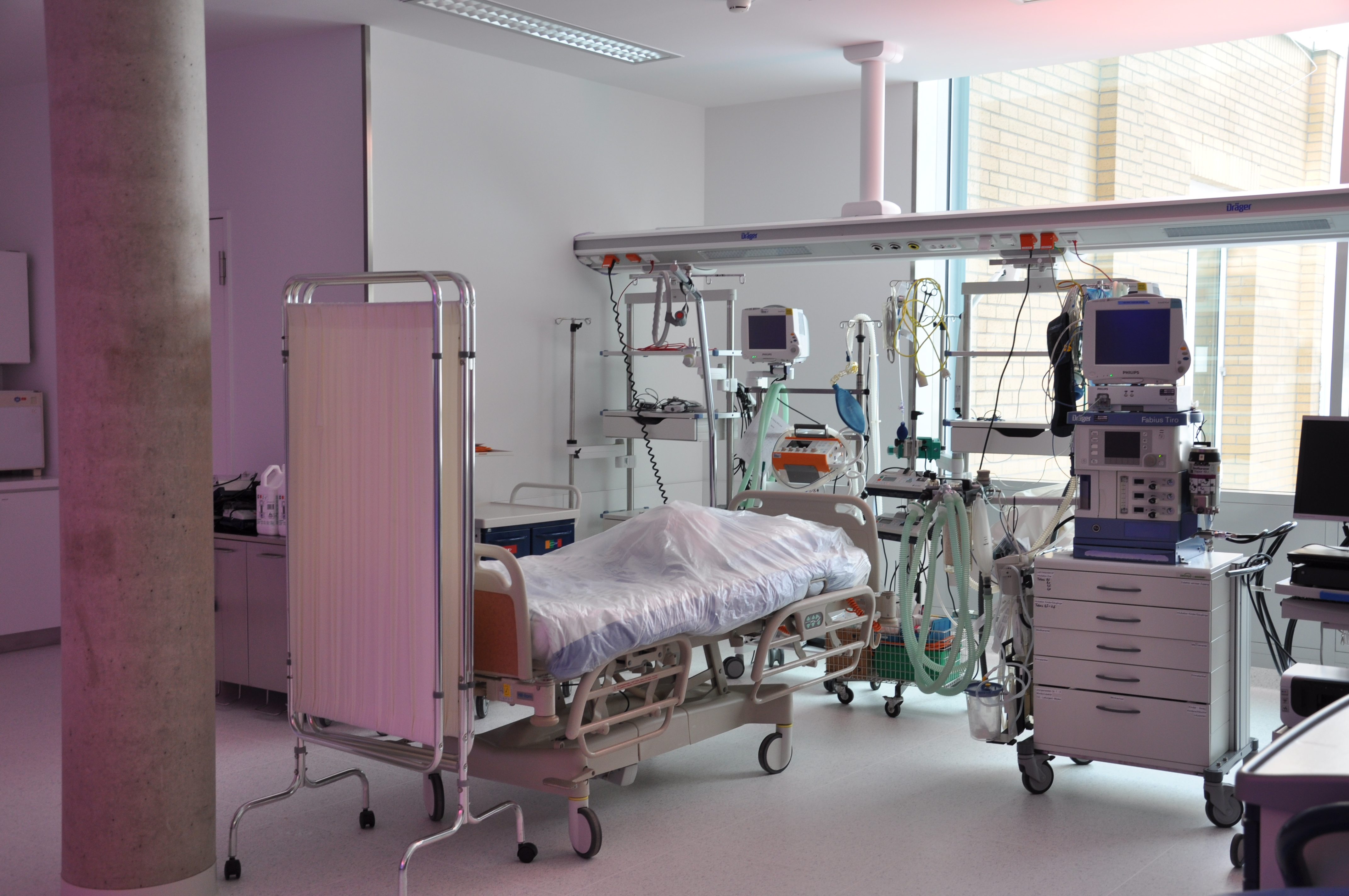 Ravensburg, Krankenhaus St. Elisabeth, Aufwachraum im neuen Bettenhaus (am Tag der offenen Tür 2013)